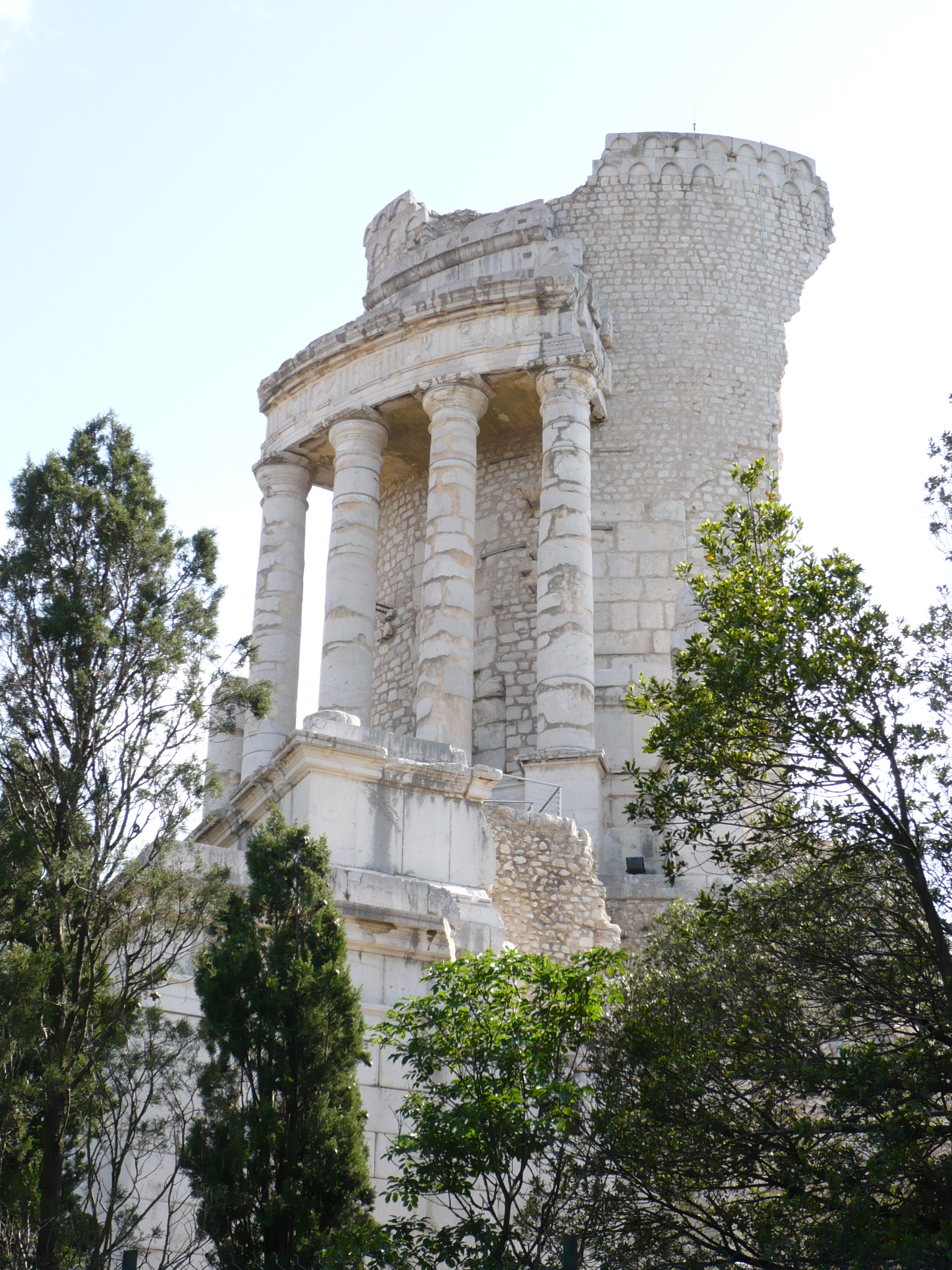 Tropaeum Alpium, La Turbie, France